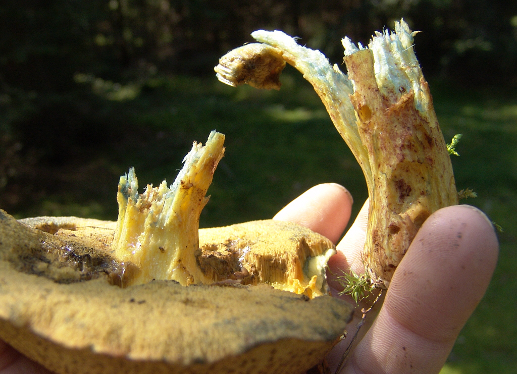 Der Stiel vieler Pilzarten - außer Täublingen und Milchlingen - lässt sich nur faserig zerteilen. Das Bild zeigt den eßbaren Sandröhrling. (2005)